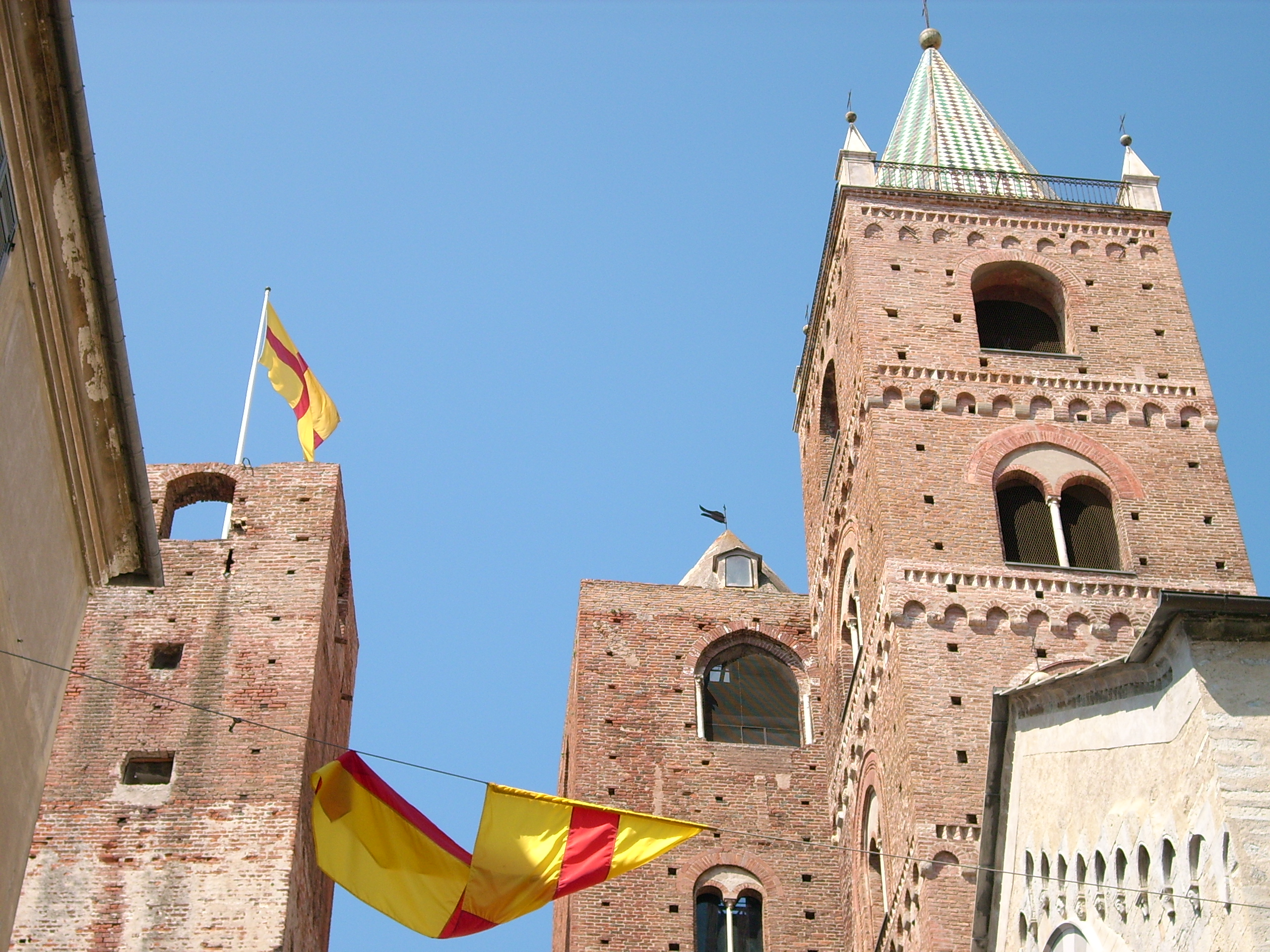 Albenga, Liguria, Italia